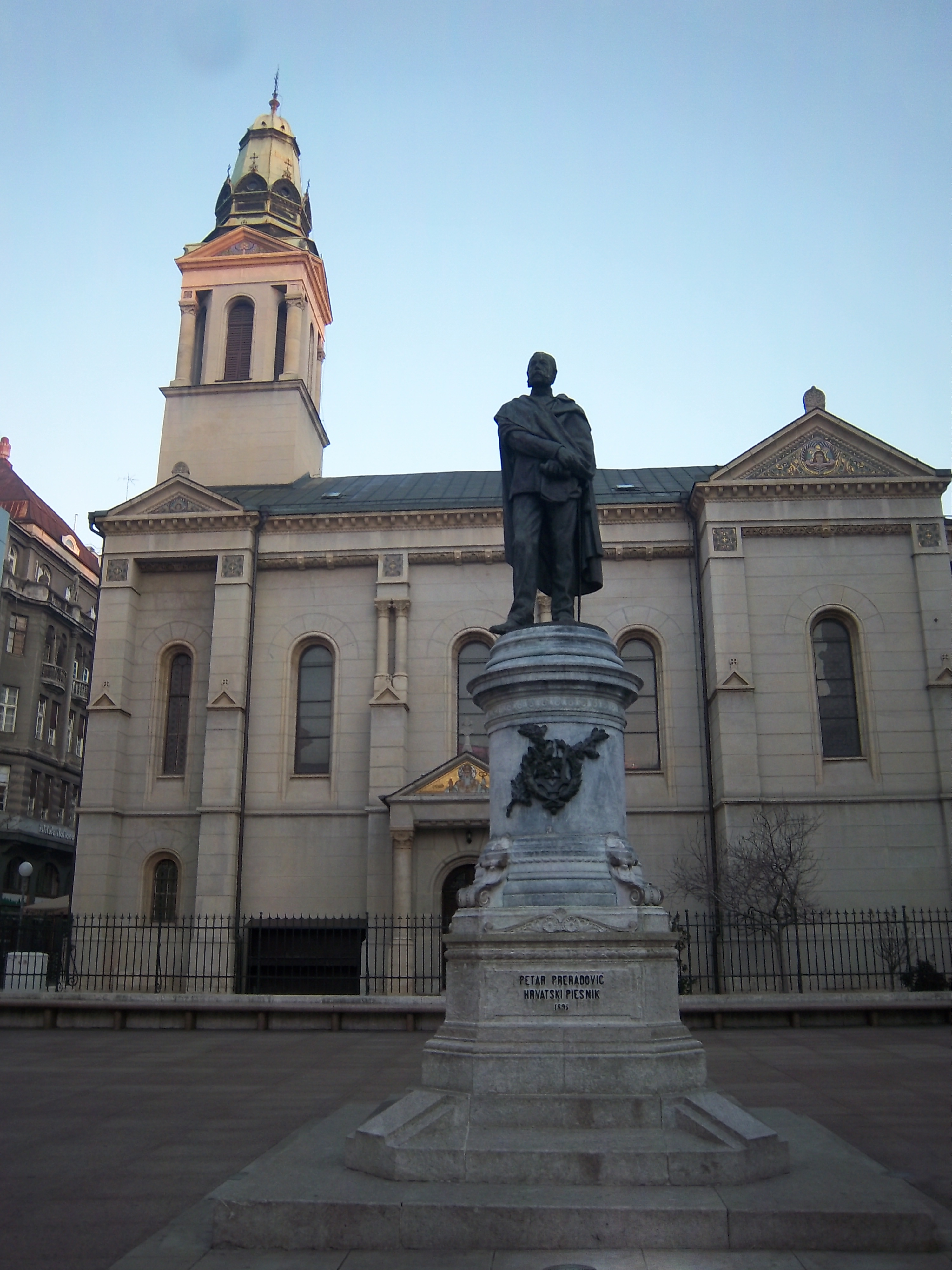 Srpskohrvatski / српскохрватски: Hram preobraženja Gospodnjeg